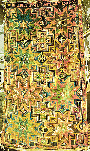 Армянский ковер ереван